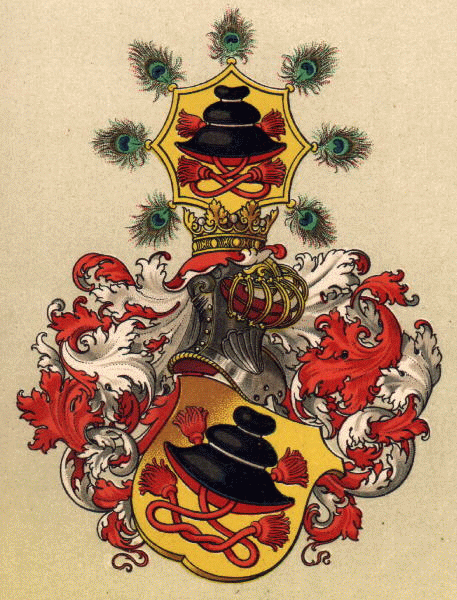 Grb Slovenske krajine oziroma marke.